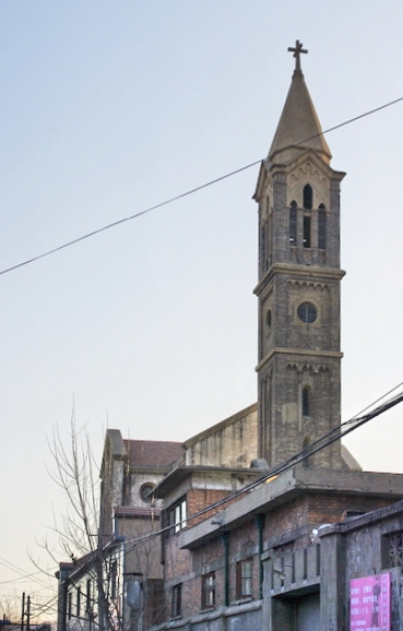 中国 河南开封 耶稣圣心主教座堂